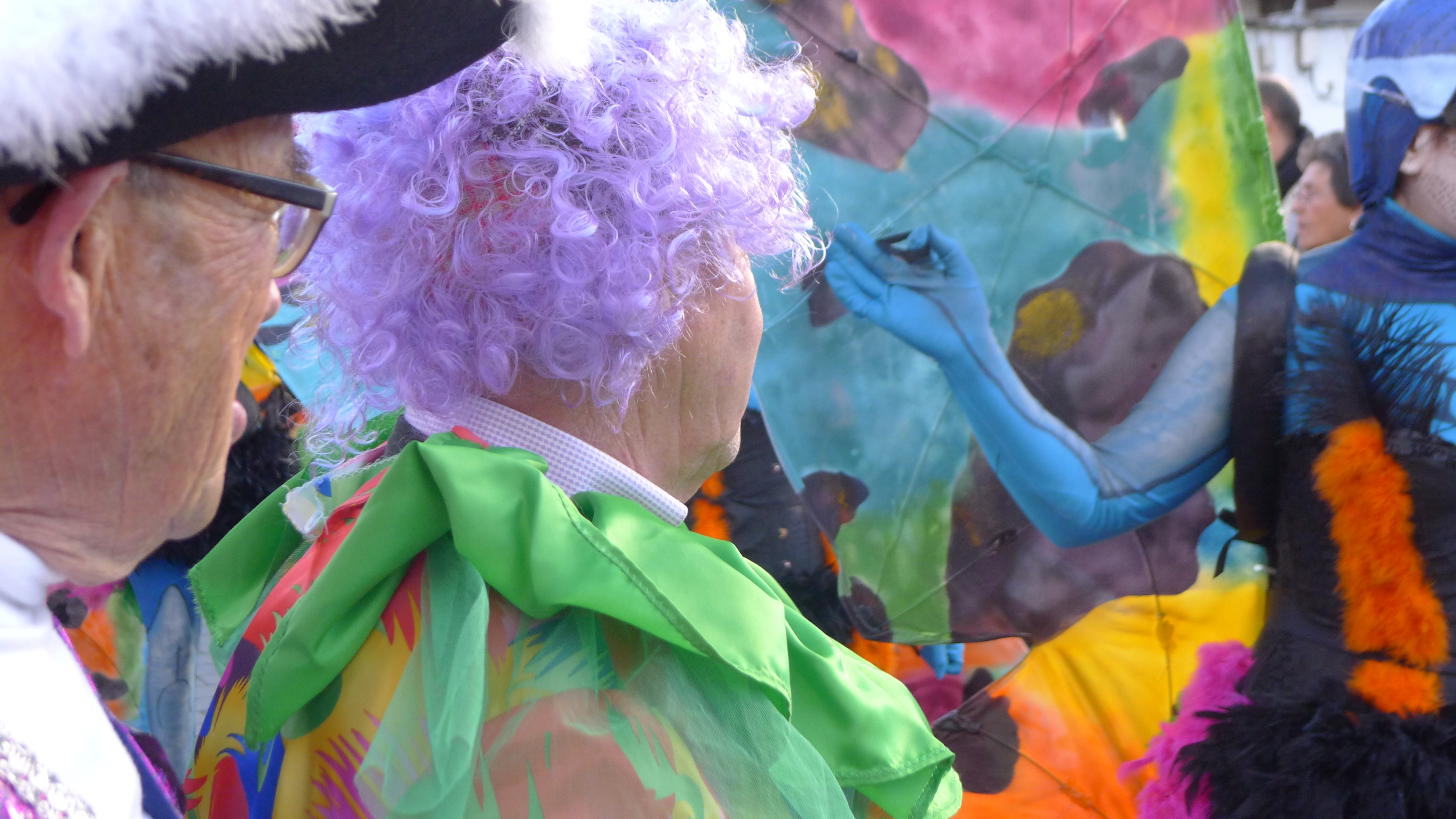 Carnaval 2015